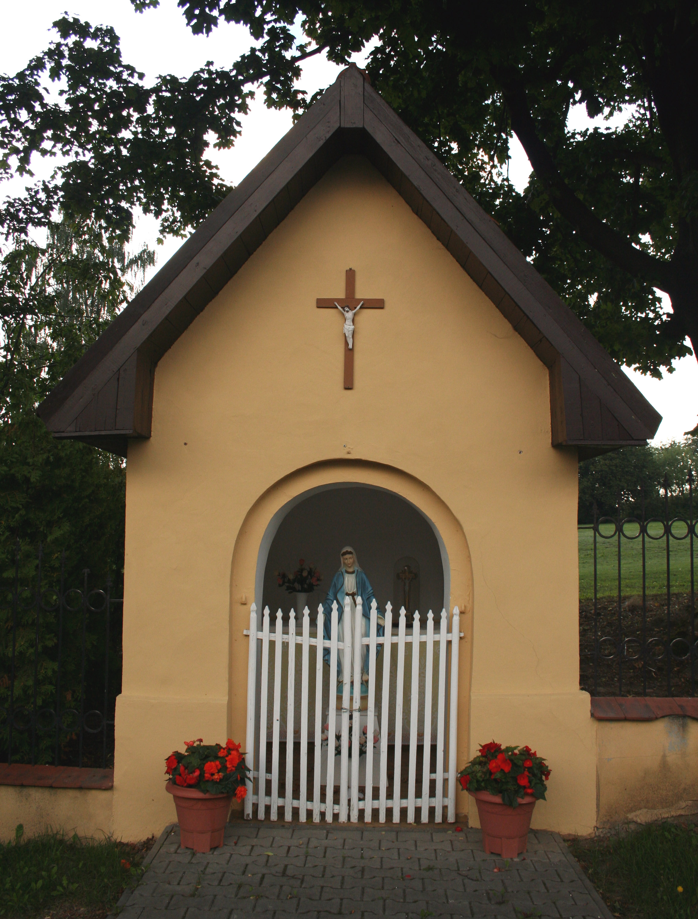 kapliczka w Lubszy, w pobliżu kościoła, powiat lubliniecki